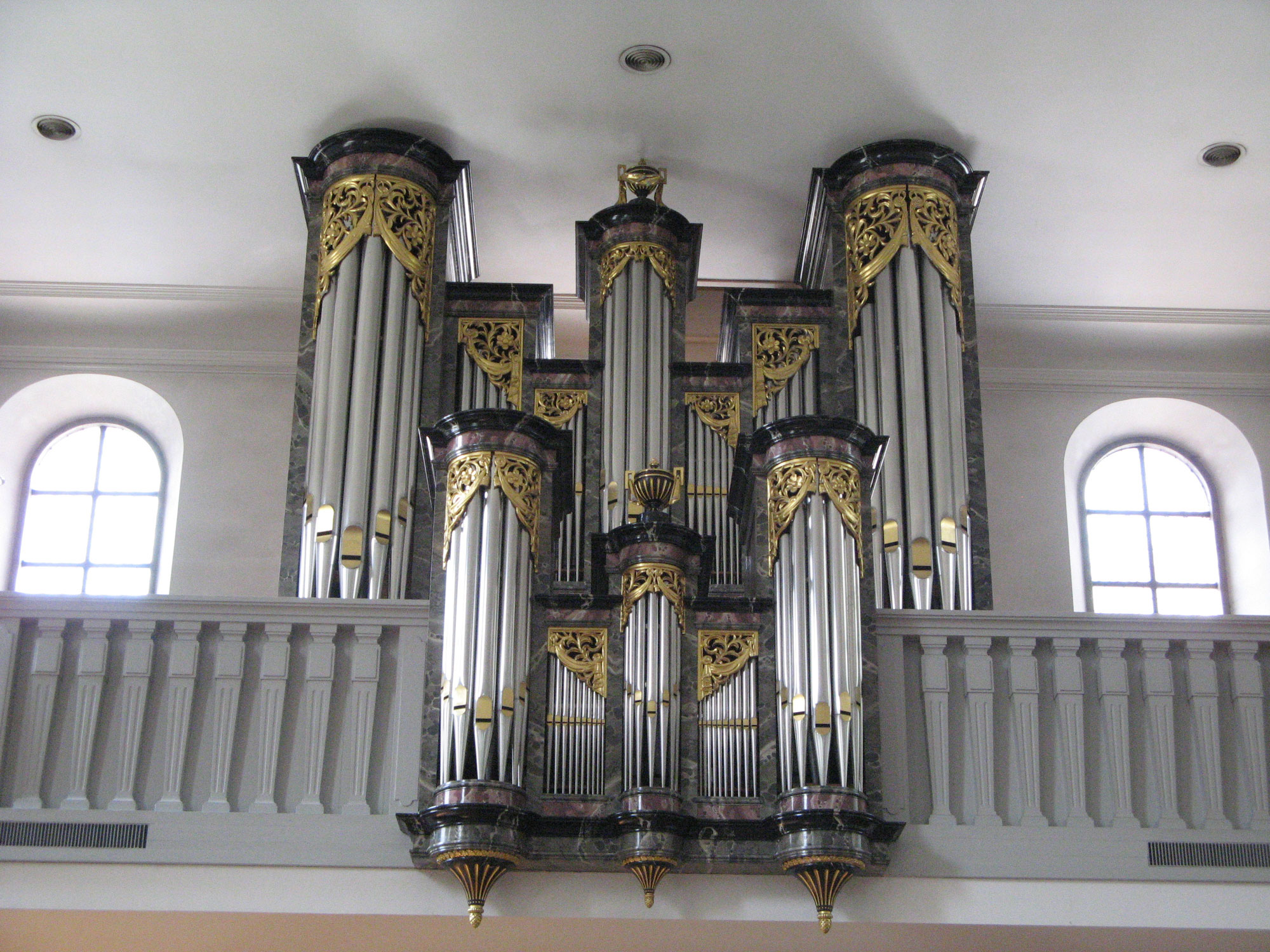 Stadtkirche Mellingen, Orgel